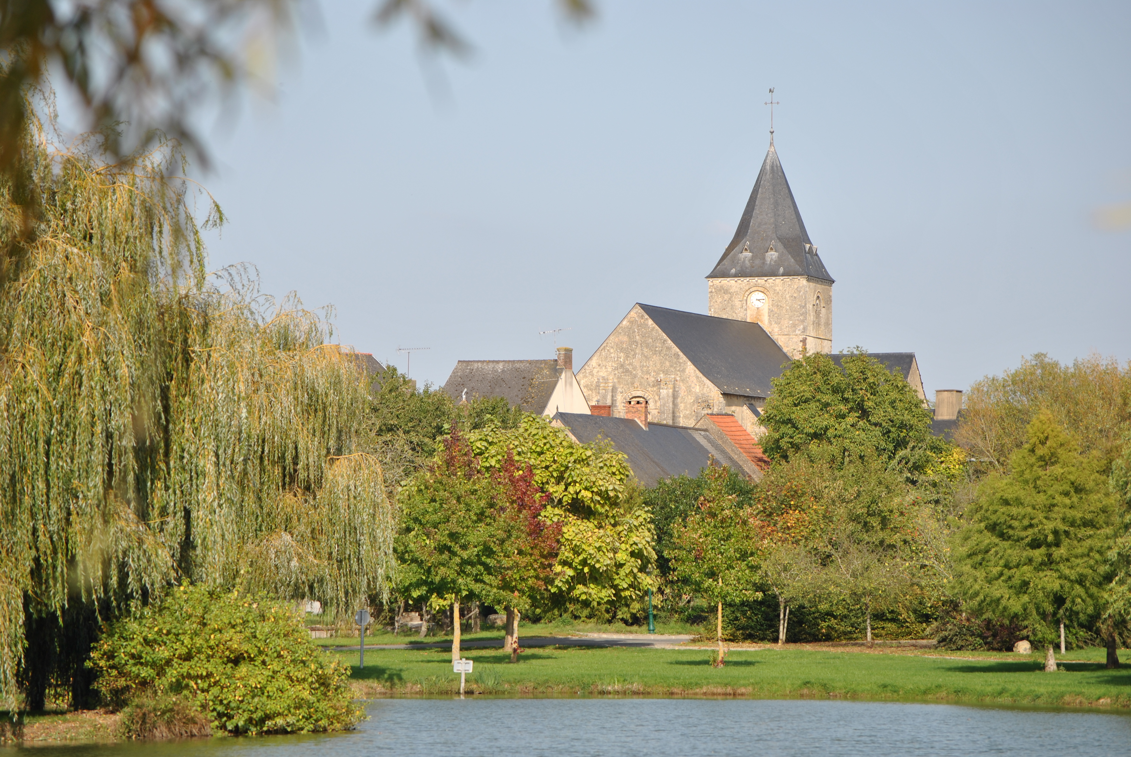 Étang de Tennie (France, Pays de la Loire)